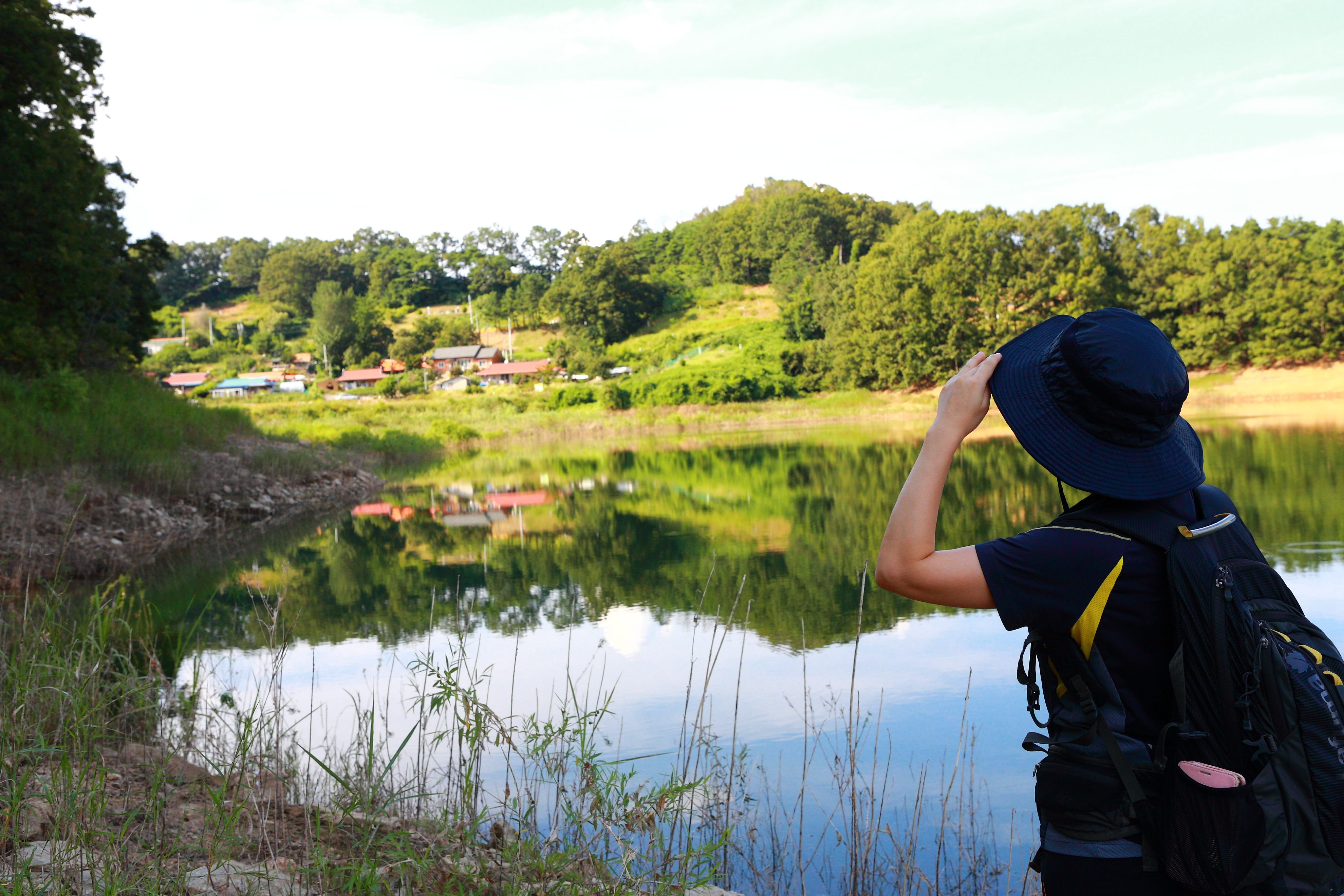 대청호오백리길 1구간